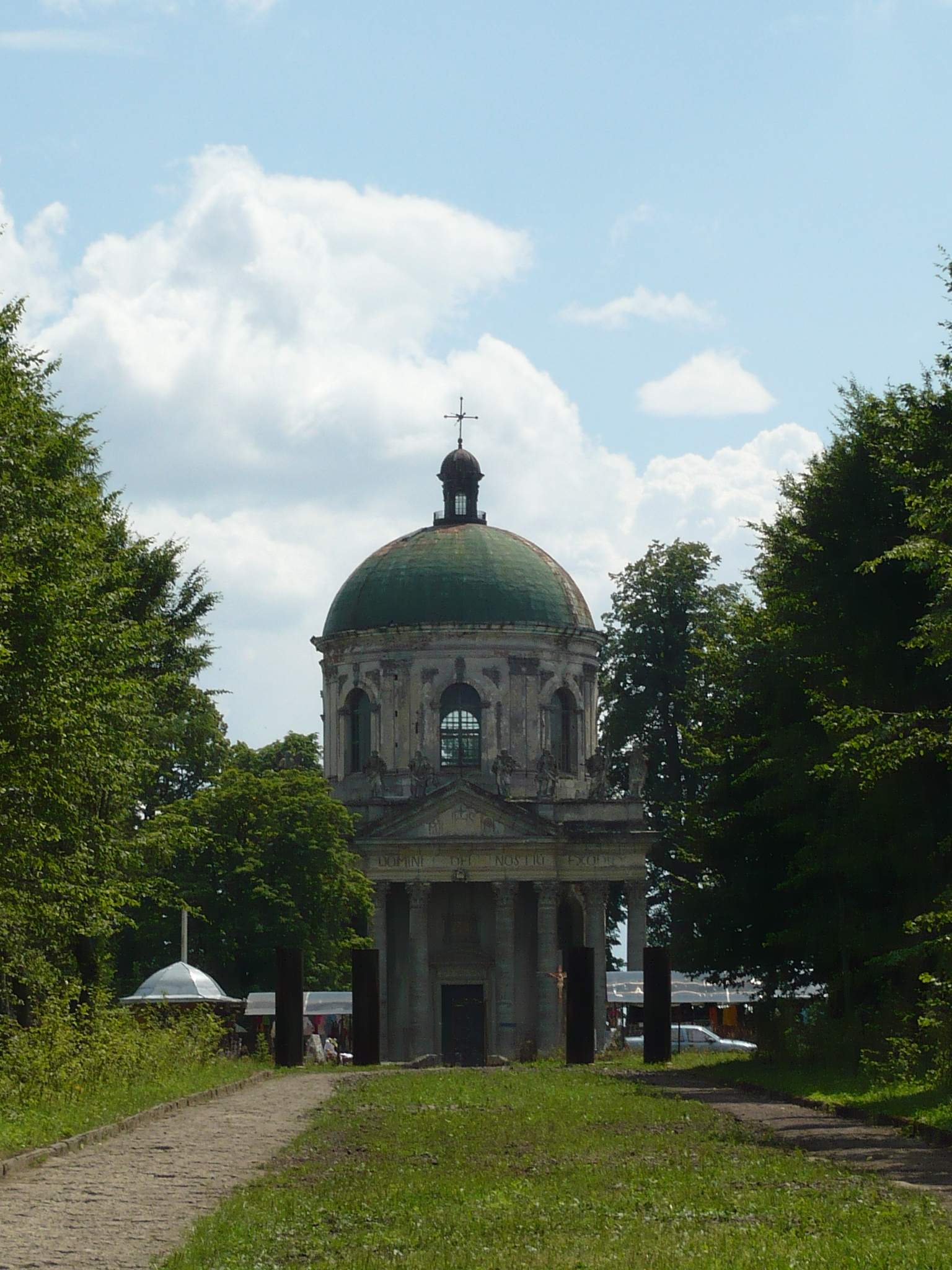 Kościół pw. św. Józefa w Podhorcach, 2012 r.